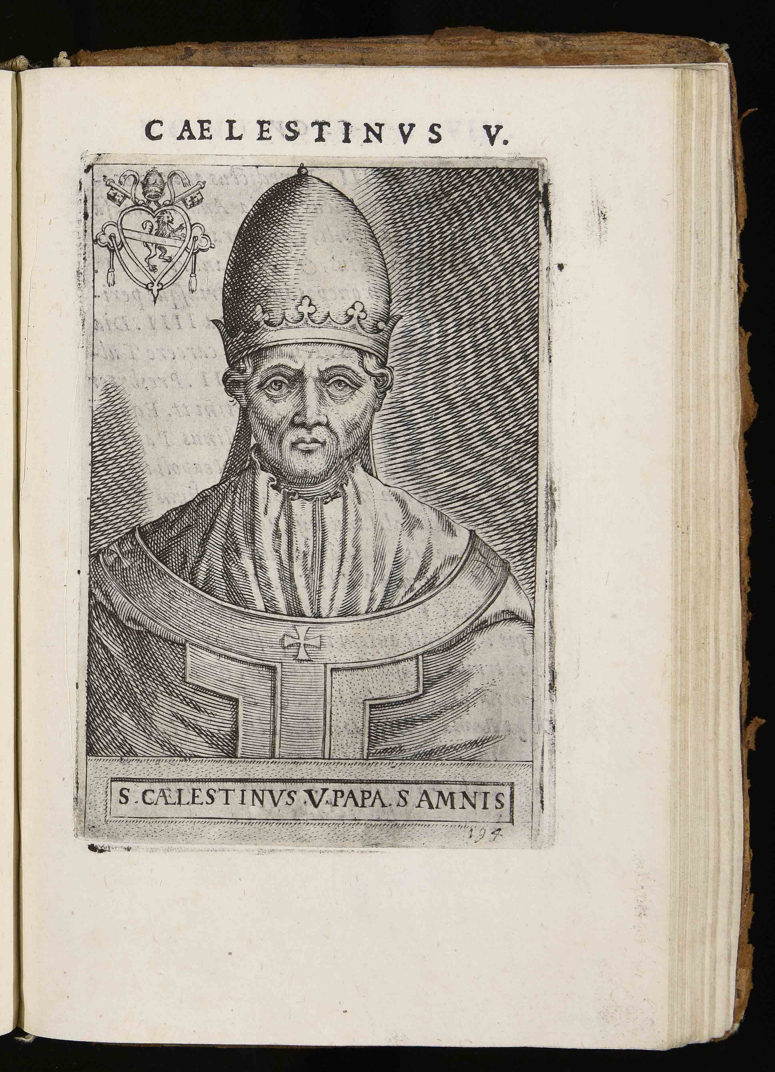 Calcografia in Giovanni Battista Cavalieri, Pontificum Romanorum effigies, Roma, Basa Domenico\Zanetti Francesco, 1580.